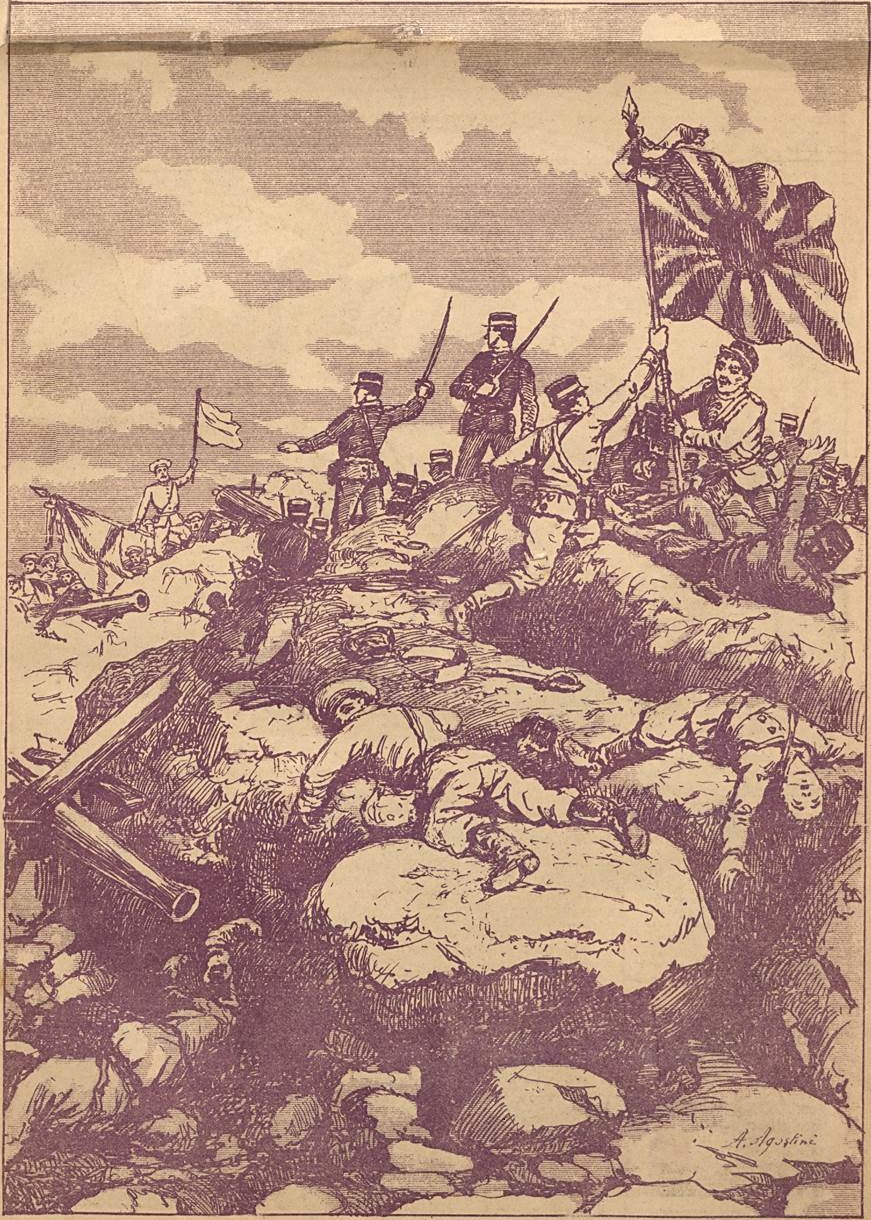 A Rendição de Porto Arthur. Arvorada a bandeira branca em Porto Arthur e abatida a da Rússia, as tropas do Mikado fincam a bandeira gloriosa do Japão sobre a ruína das heroicas muralhas da mais formidável praça de guerra do mundo.